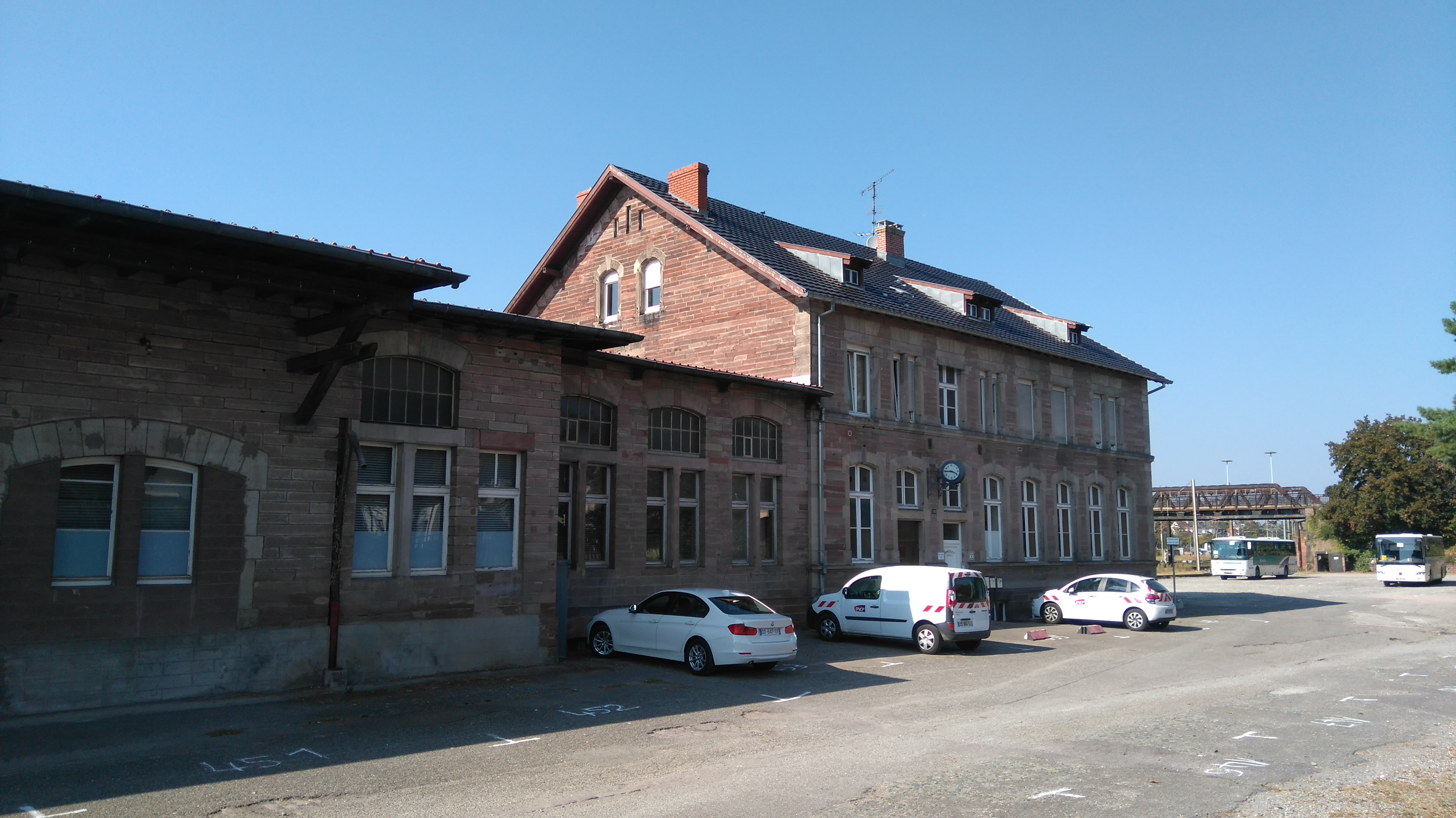 Bâtiment principal de la gare aux marchandises de Colmar.